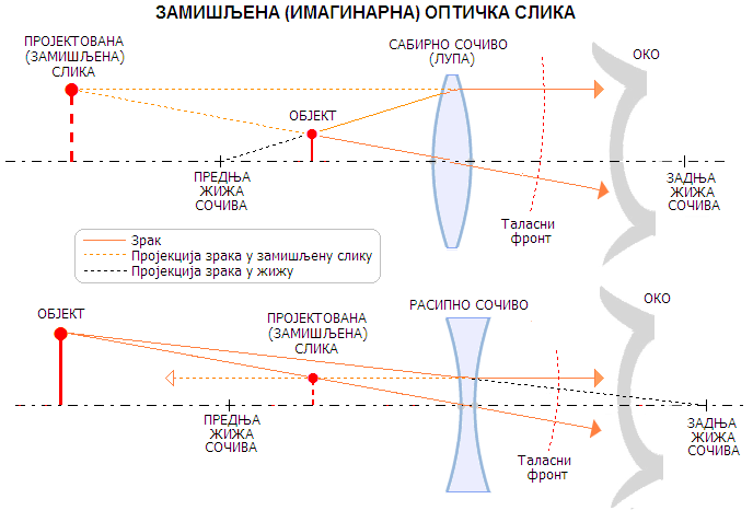 Српски (ћирилица): Геометрија замишљене оптичке слике